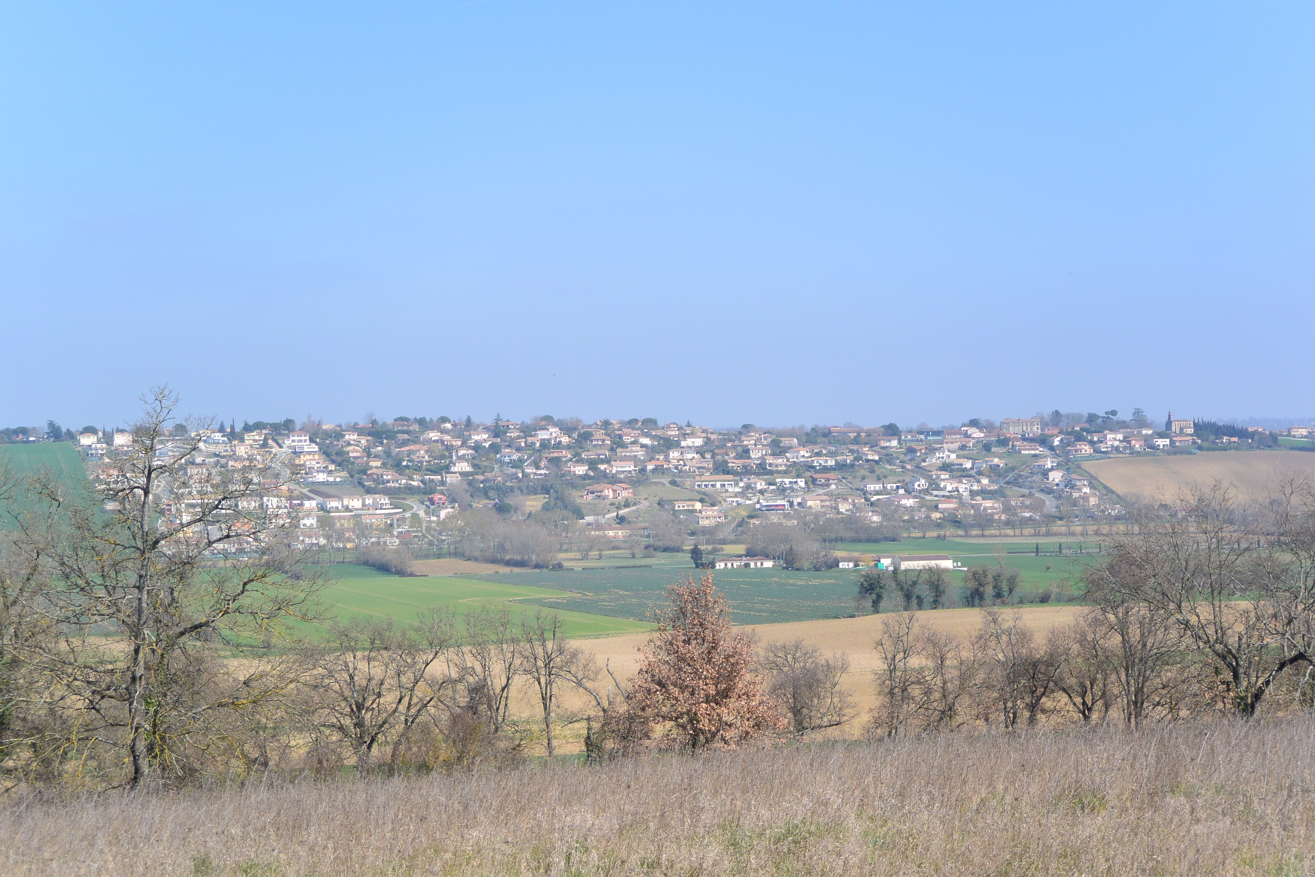 Lauzerville , F 31650. Photo prise depuis Saint-Orens-de-Gameville (43.545157N / 1.547270E)